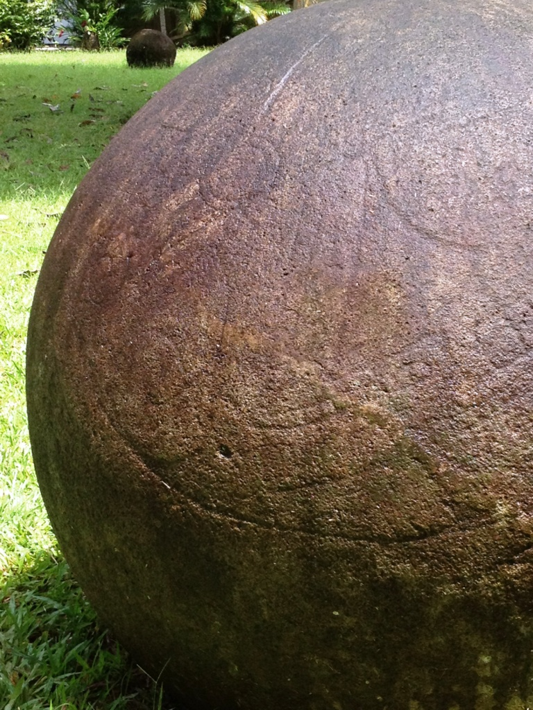 Las Esferas de Piedra de Costa Rica son singulares monolitos que se han encontrado en este país. Por ahora se han contado más de 500 esferas de tamaños que oscilan entre los 30cm y 257cm. Tienen una altísima perfección de acabado y algunas cuentan con sofisticados petroglifos en alto y bajo relieve, como los de la foto. Los arqueólogos no han podido datar cuándo fueron hechas y de qué manera las hicieron o como fueron trasportadas por suaves terrenos aluviales e incluso a islas.